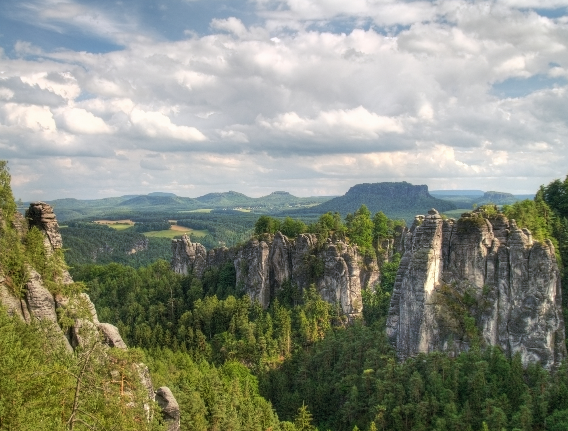 Blick auf den Lilienstein und die Sächsische Schweiz über die Felsen der Bastei